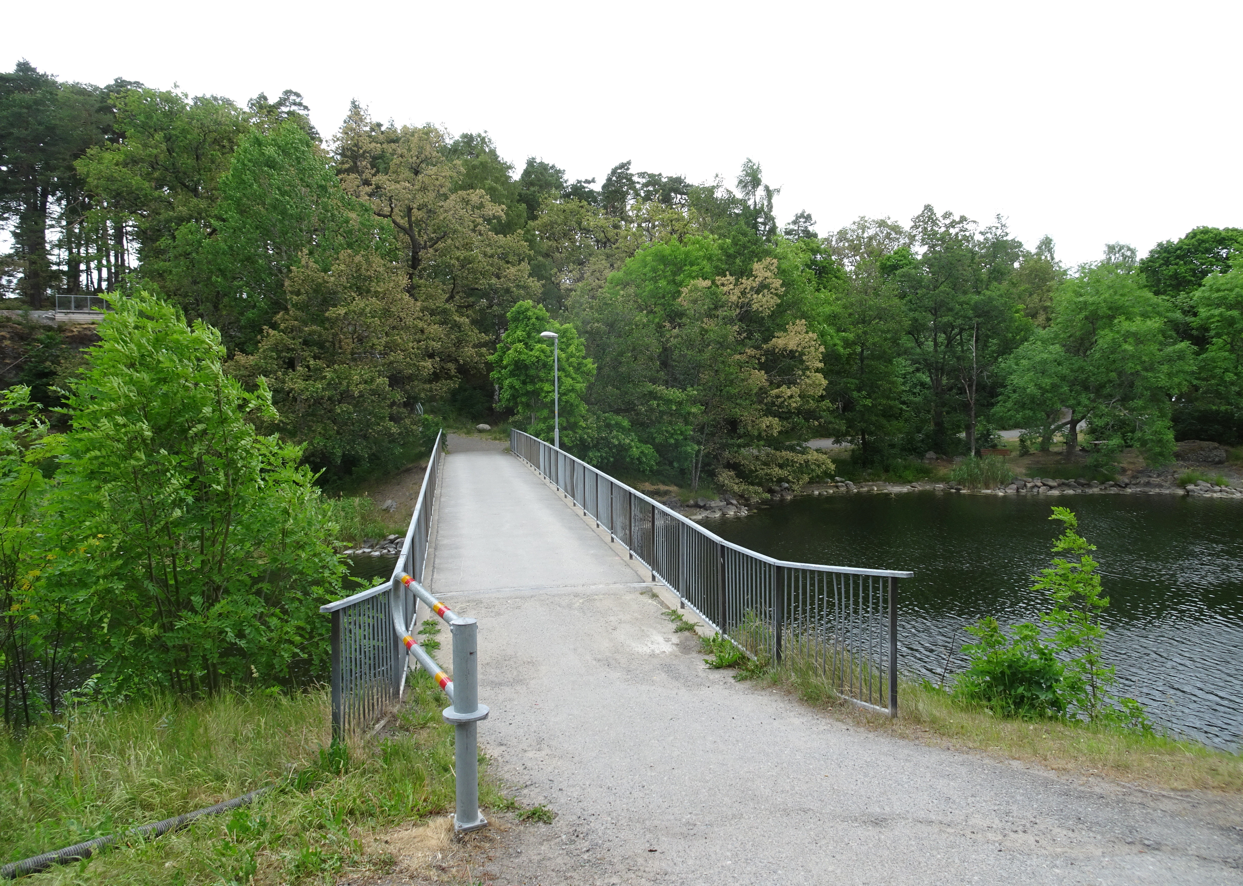 Gång- och cykelbron till Fisksätraholmen